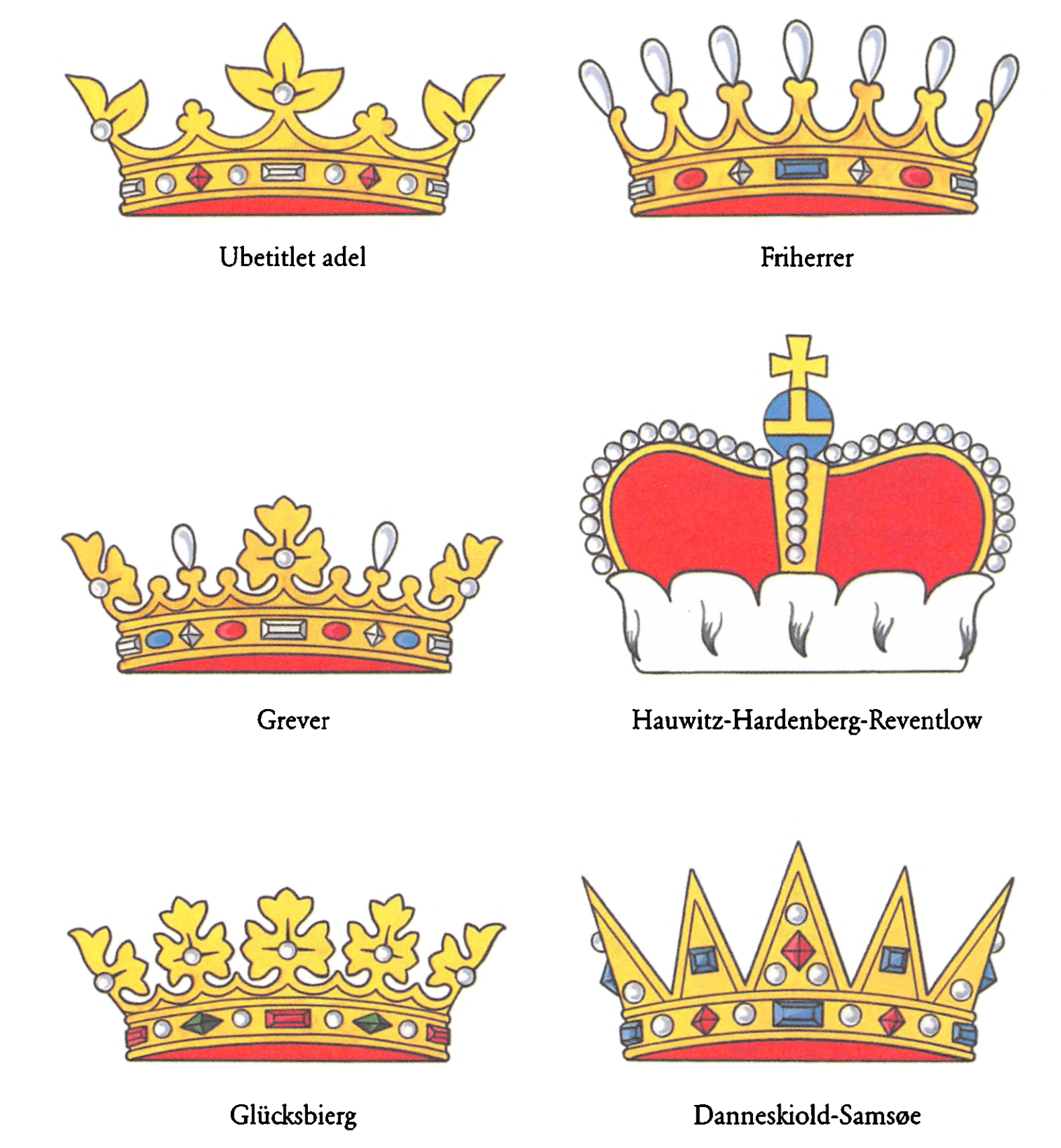 Nytegninger udført af Ronny Andersen over rangkronerne i dansk adelsheraldrik